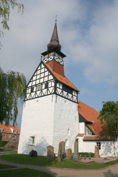 Nexø kirke / Kirche